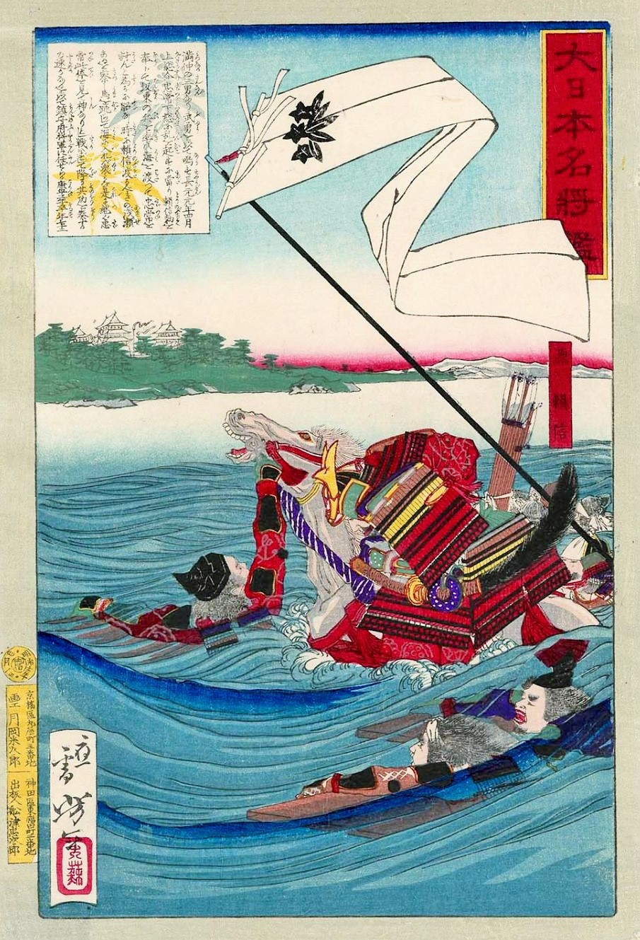 大日本名将鑑 源頼信。『今昔物語集』では、平忠常の乱の討伐に向かい、浅瀬を渡って攻め入り、たちまちのうちに降伏させたとされる